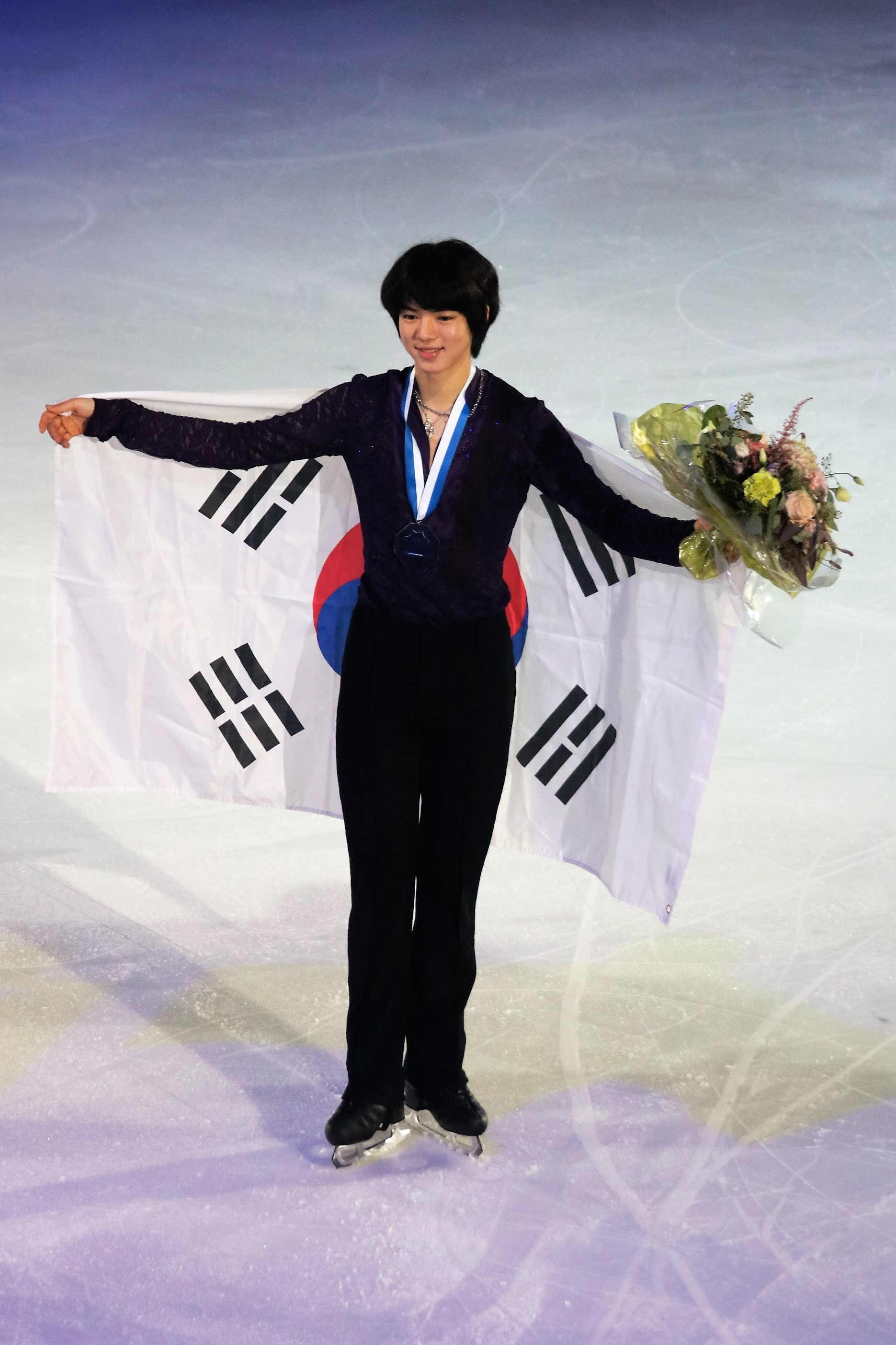 Чха Чжун Хван (Южная Корея) на церемонии награждения Гран-при Хельсинки 2018.